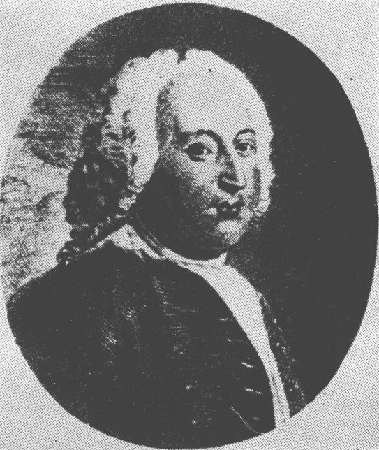 Christfried Kirch Direktor (der Berliner Sternwarte) von 1716 bis 1740. Jahr unbekannt; Original-Quelle unbekannt.